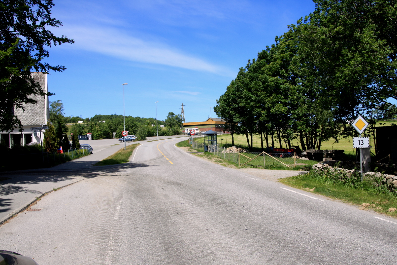 Fylkesvei 315